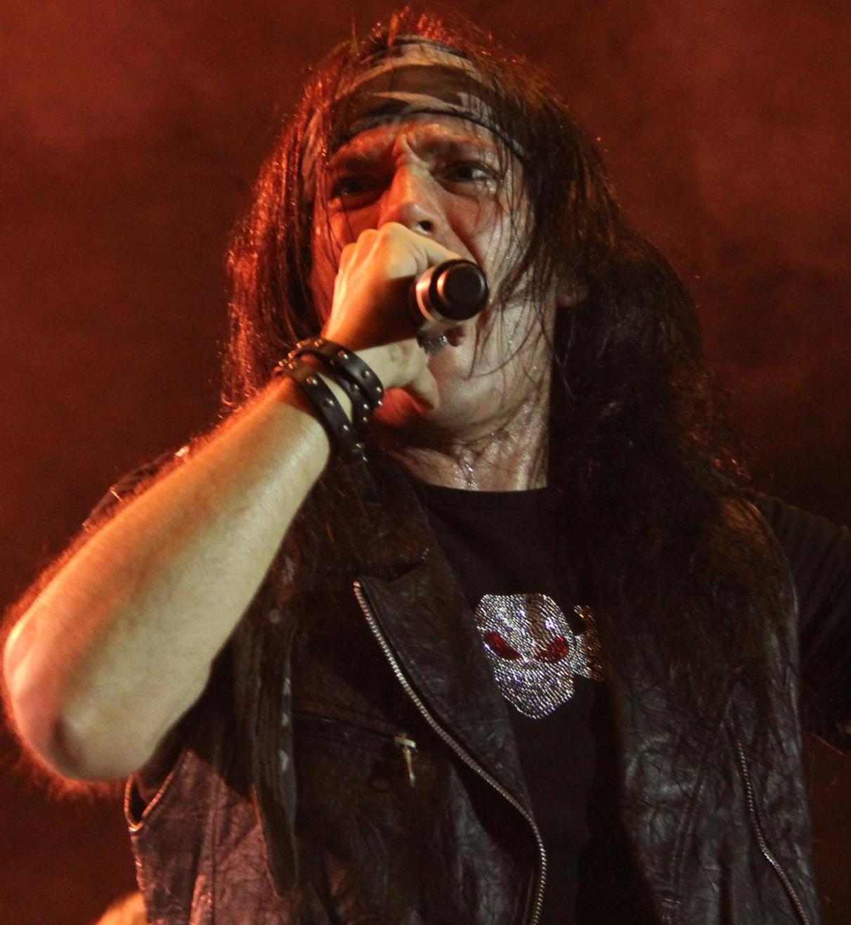 Zeta en un concierto de Mägo de Oz (4).